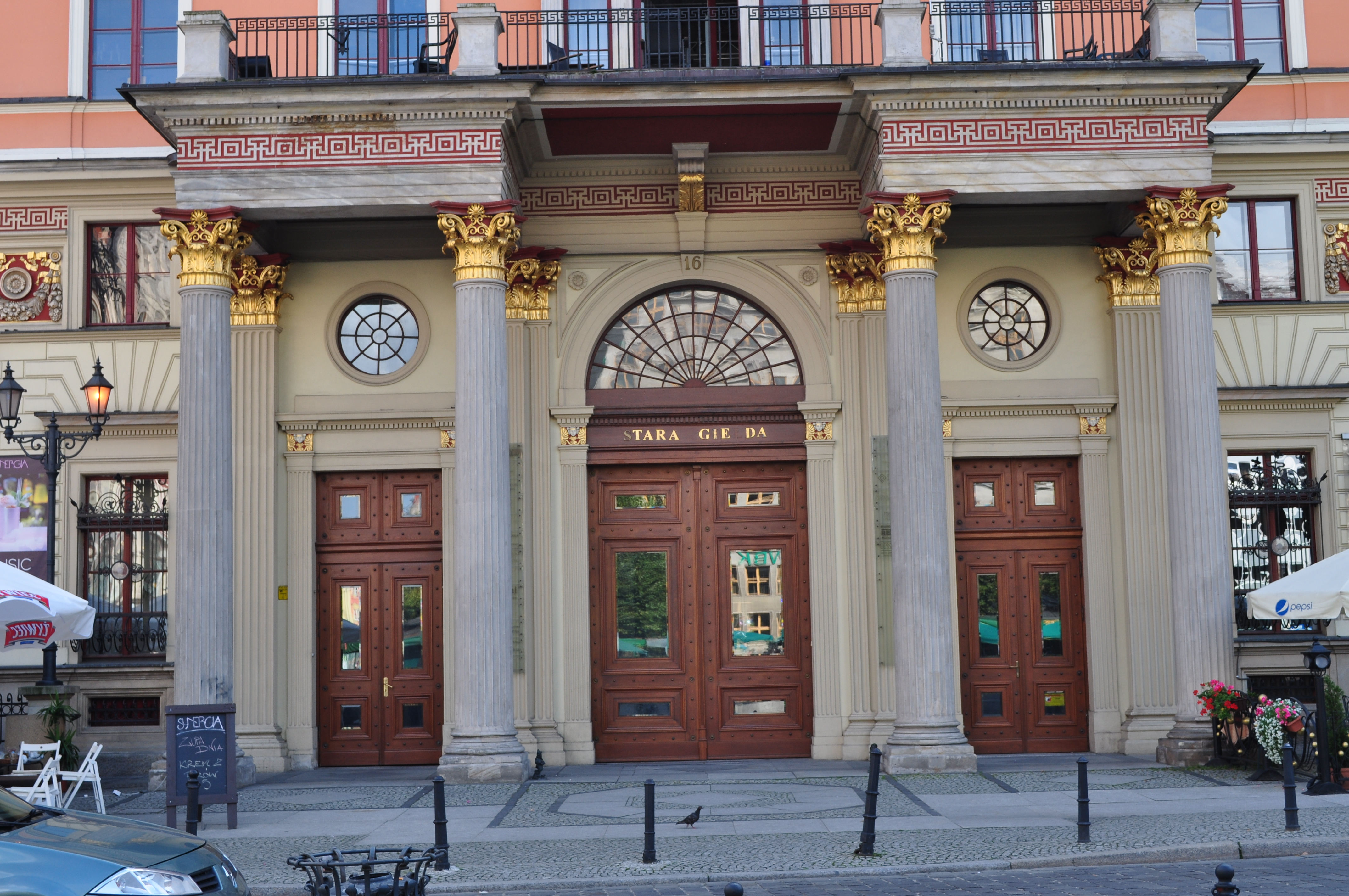 Wrocław Stare Miasto - pl. Solny 16 - Stara Giełda, obecnie budynek biurowy, 1822-1824 (drzwi wejściowe)